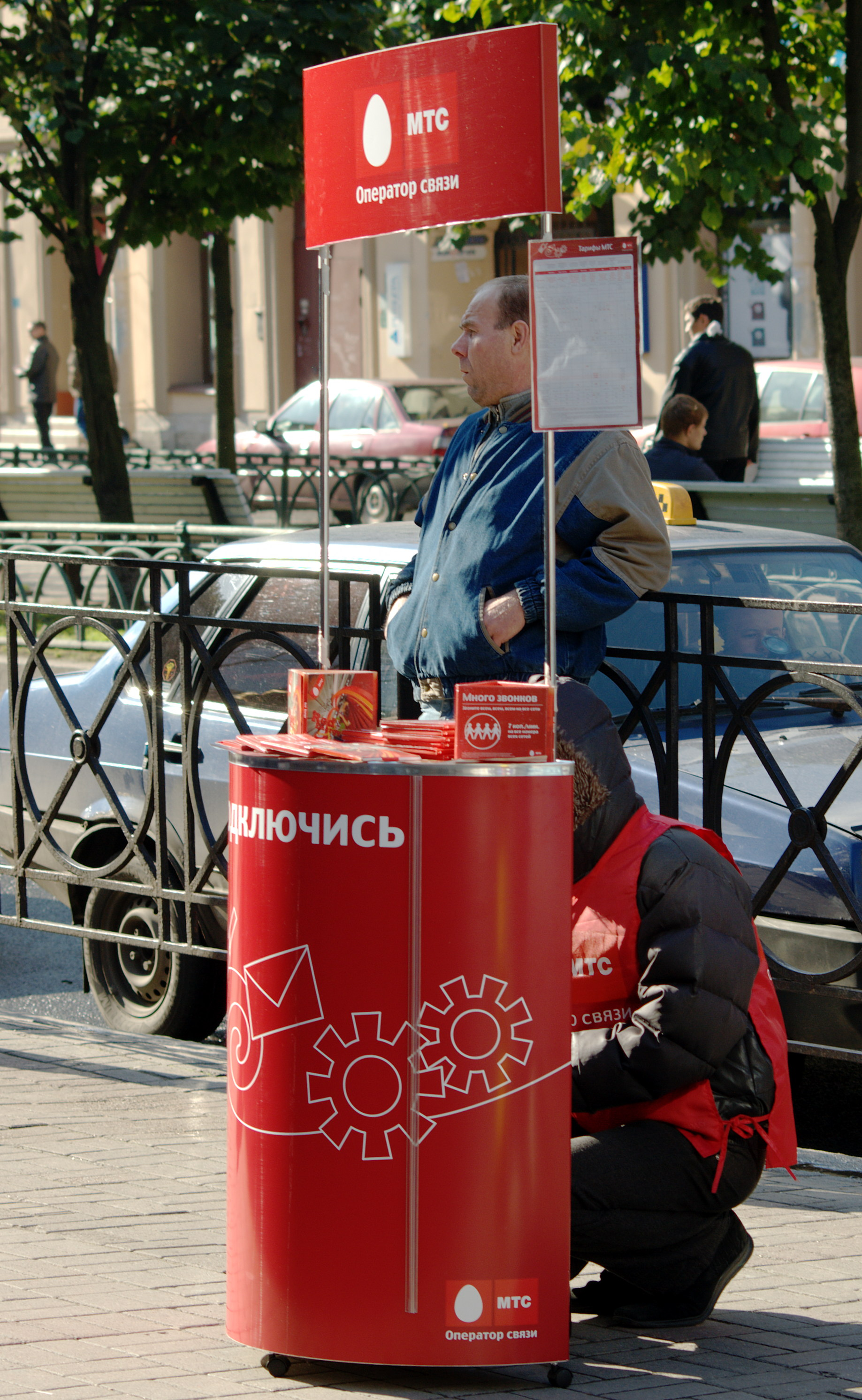 Точка продаж МТС возле ст.м. Чернышевская